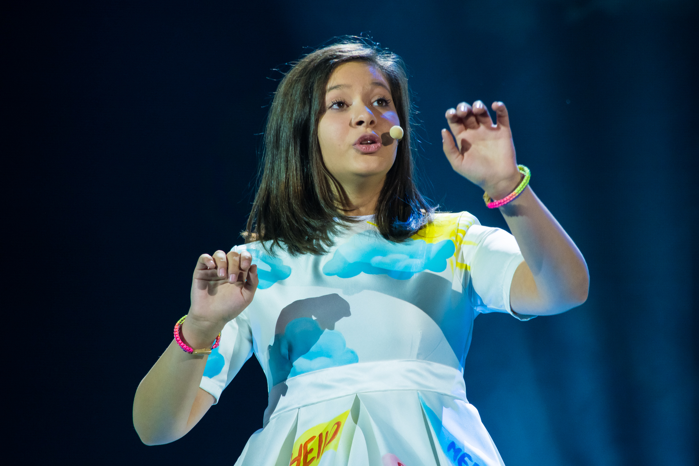 Мишела Рапо на сцене Детского Евровидения 2015 («Армеец», София) во время генеральной репетиции